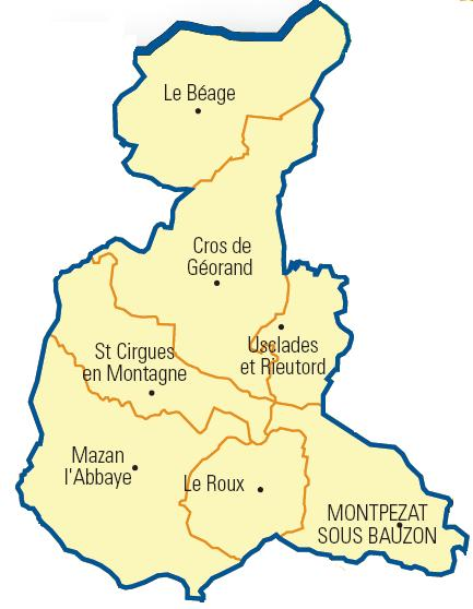 Carte détaillée des communes du canton (Ardèche)